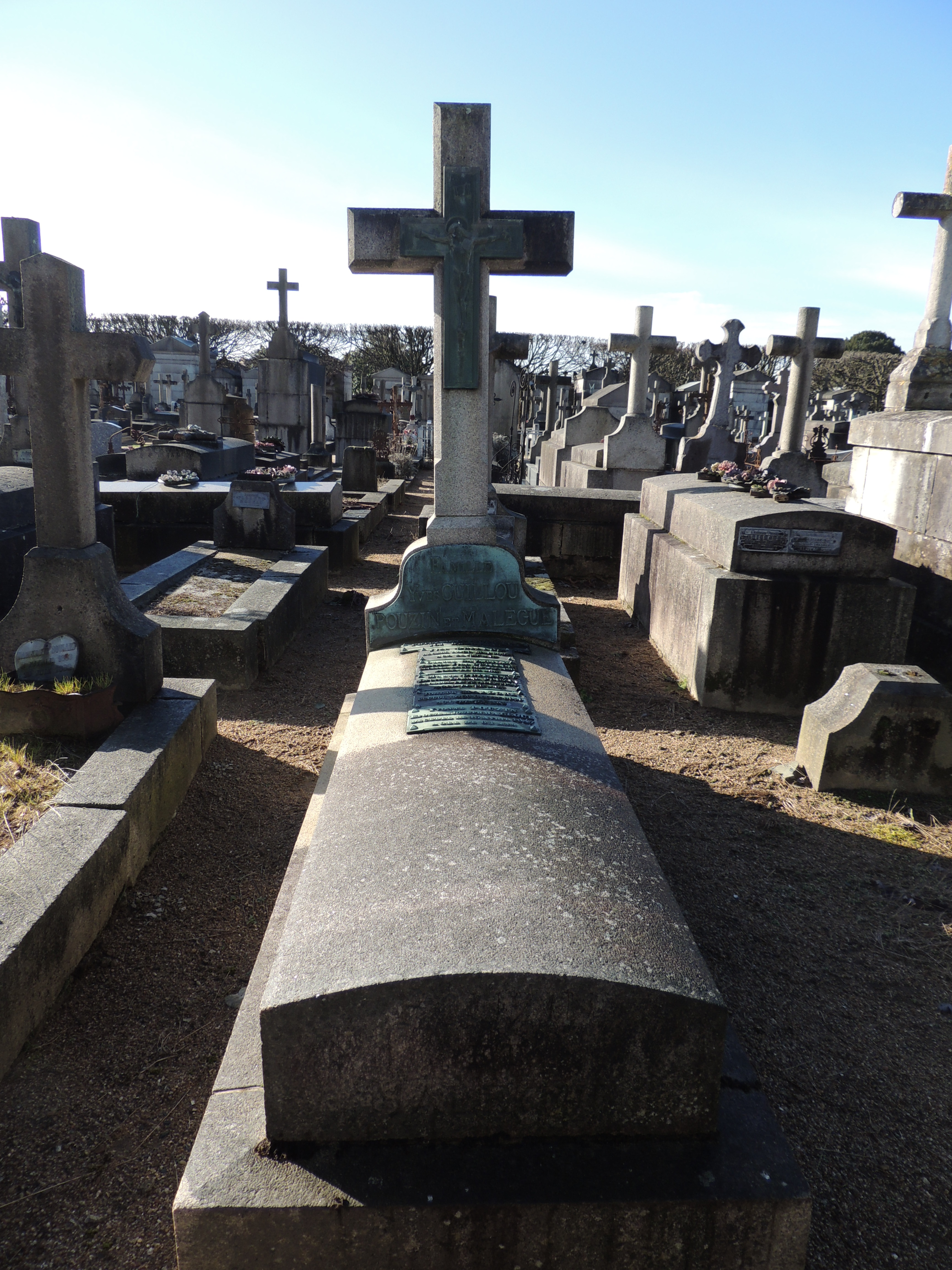 Tombe du médecin Yvonne Pouzin et de l'écrivain Joseph Malègue, cimetière Miséricorde, Nantes, France